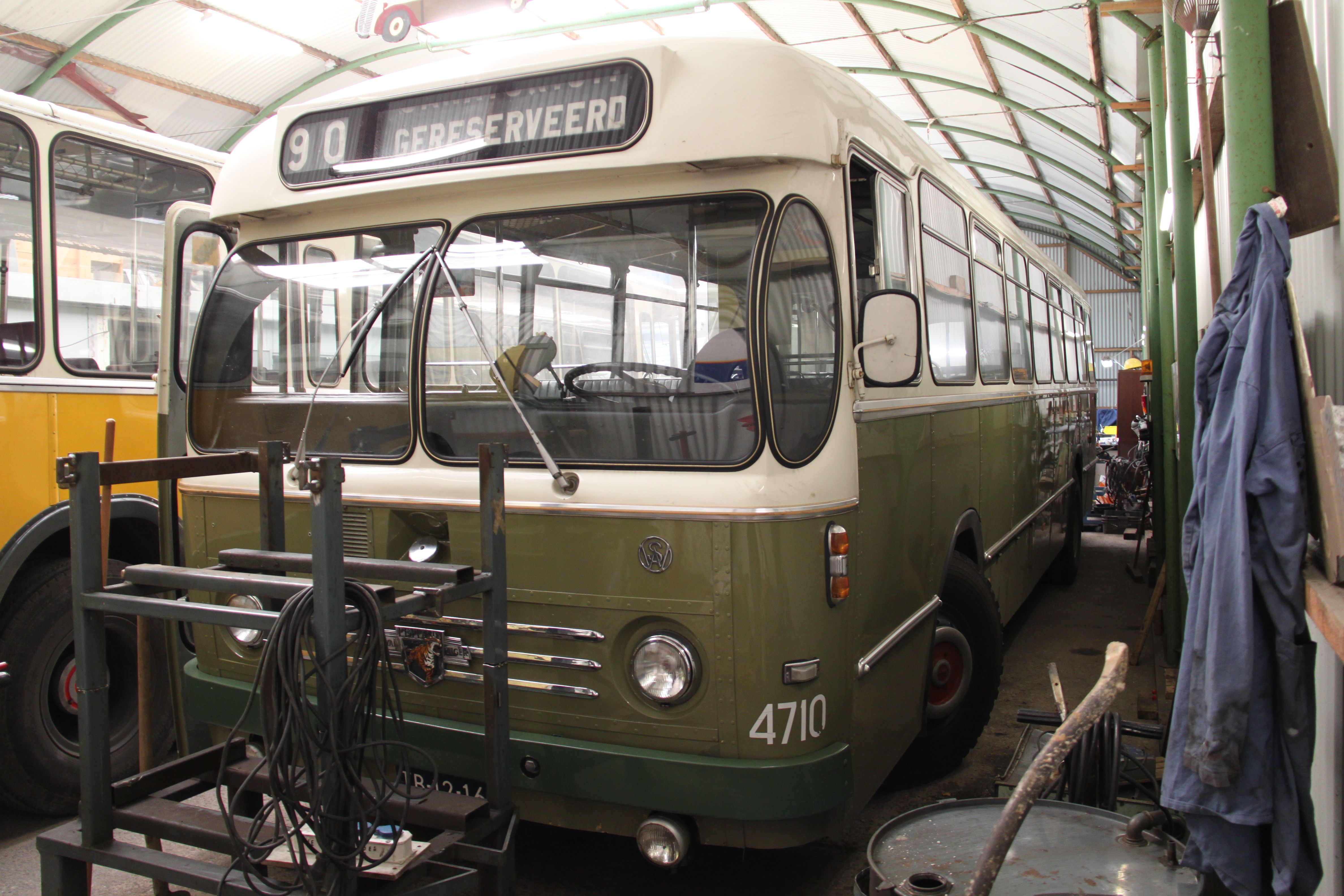 De NBM 4710 van het Nationaal Openbaar Vervoer museum in Ouwsterhaule.